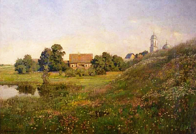 "Пейзаж с церковью" 1893. Россия Холст, масло. 41 x 59